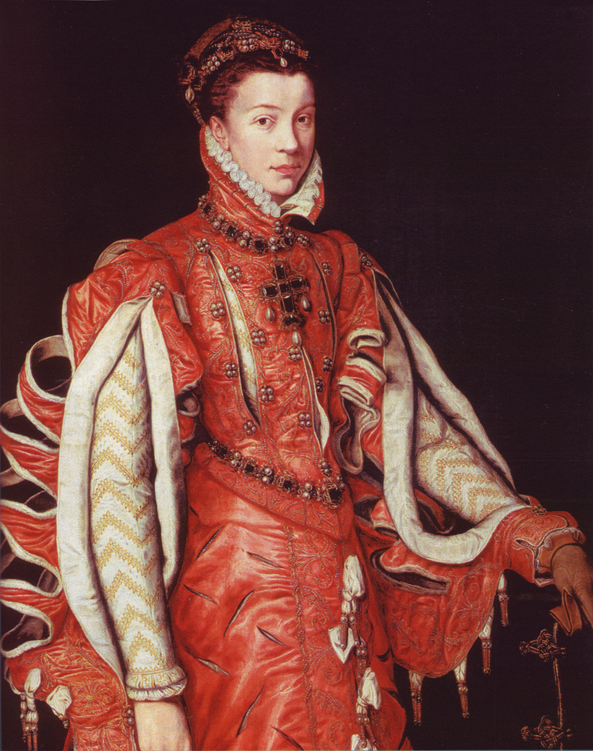 Porträt Elisabeth de Valois', dritte Ehefrau des spanischen Königs Philipp II.